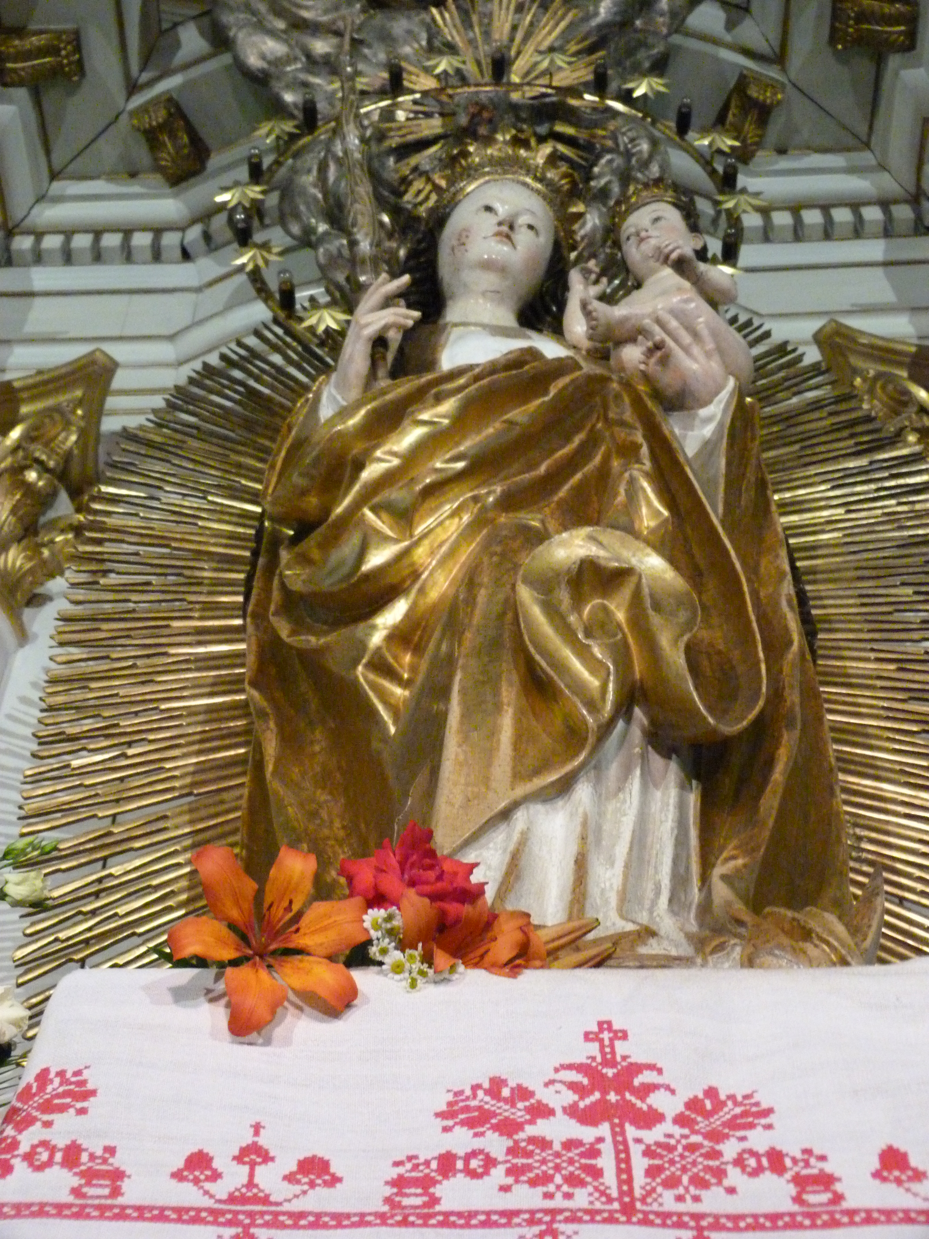 A felvétel 2013. Június 19 –én készült Csíksomlyón (Csíkszereda). Boldogasszony. Csíksomlyói Kegytemplom. ©© Derzsi Elekes Andor, Budapest, 2013, You are authorised to use this photo under Creative Commons – even for commercial, for profit purposes. The photo must be attributed to Derzsi Elekes Andor. All of the photos and vids in the Metapolisz DVD line are under Creative Commons and can be used even for commercial – for profit – purposes. Recommended Citation Derzsi Elekes Andor: Metapolisz DVD line Time: mashine time + 1 hour.